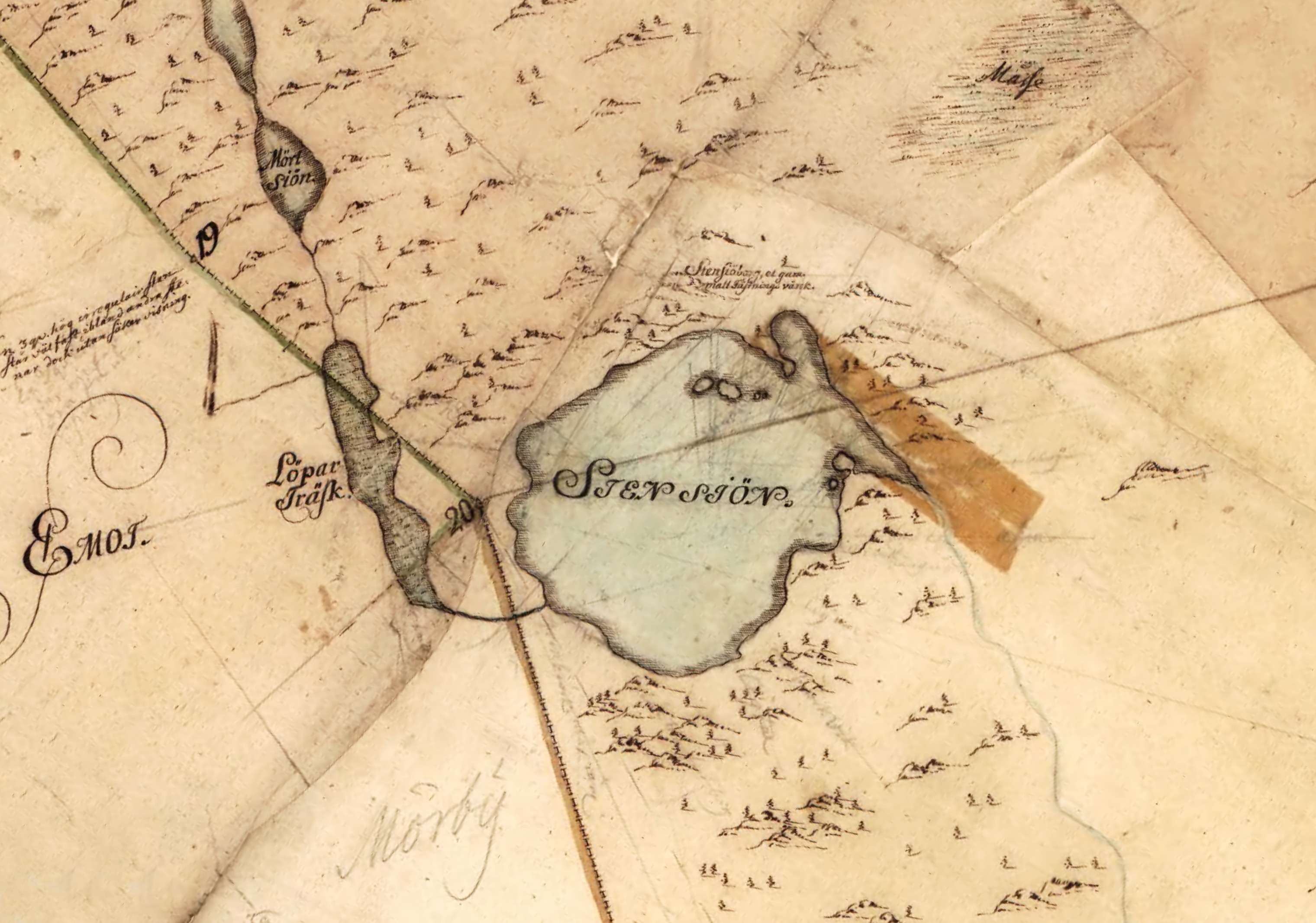 Del av arealavmätning visande Stensjön